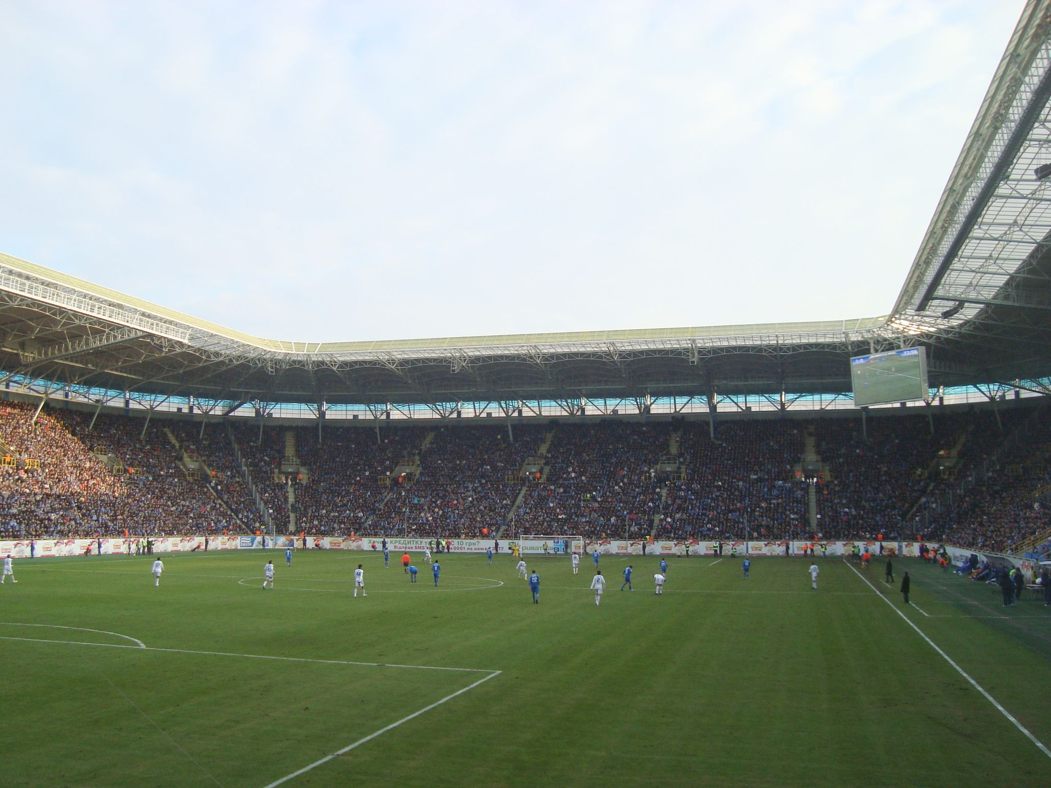 Дніпро-Арена. Аншлаг на матчі Дніпро-Динамо